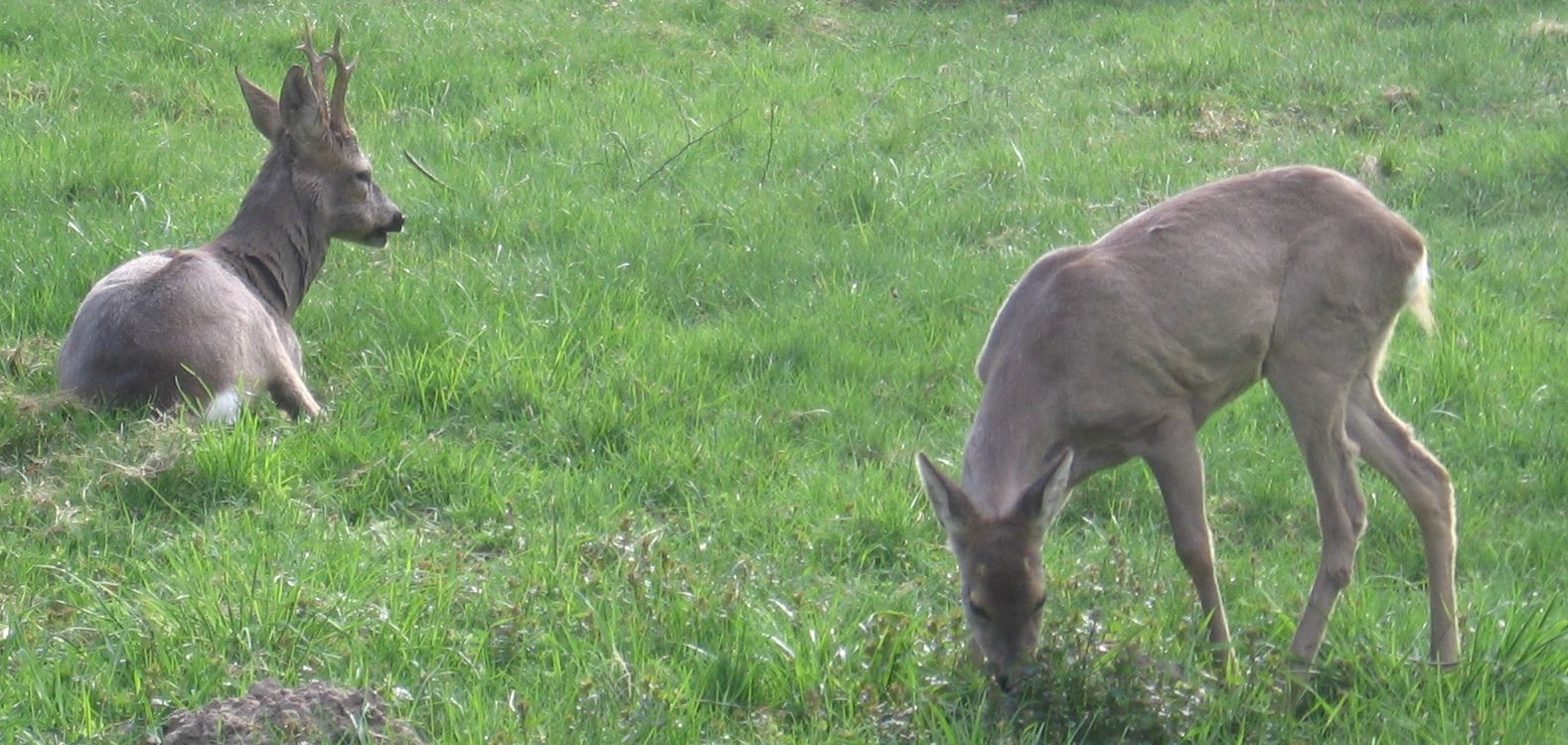 sarny, rezerwat w Białowieży